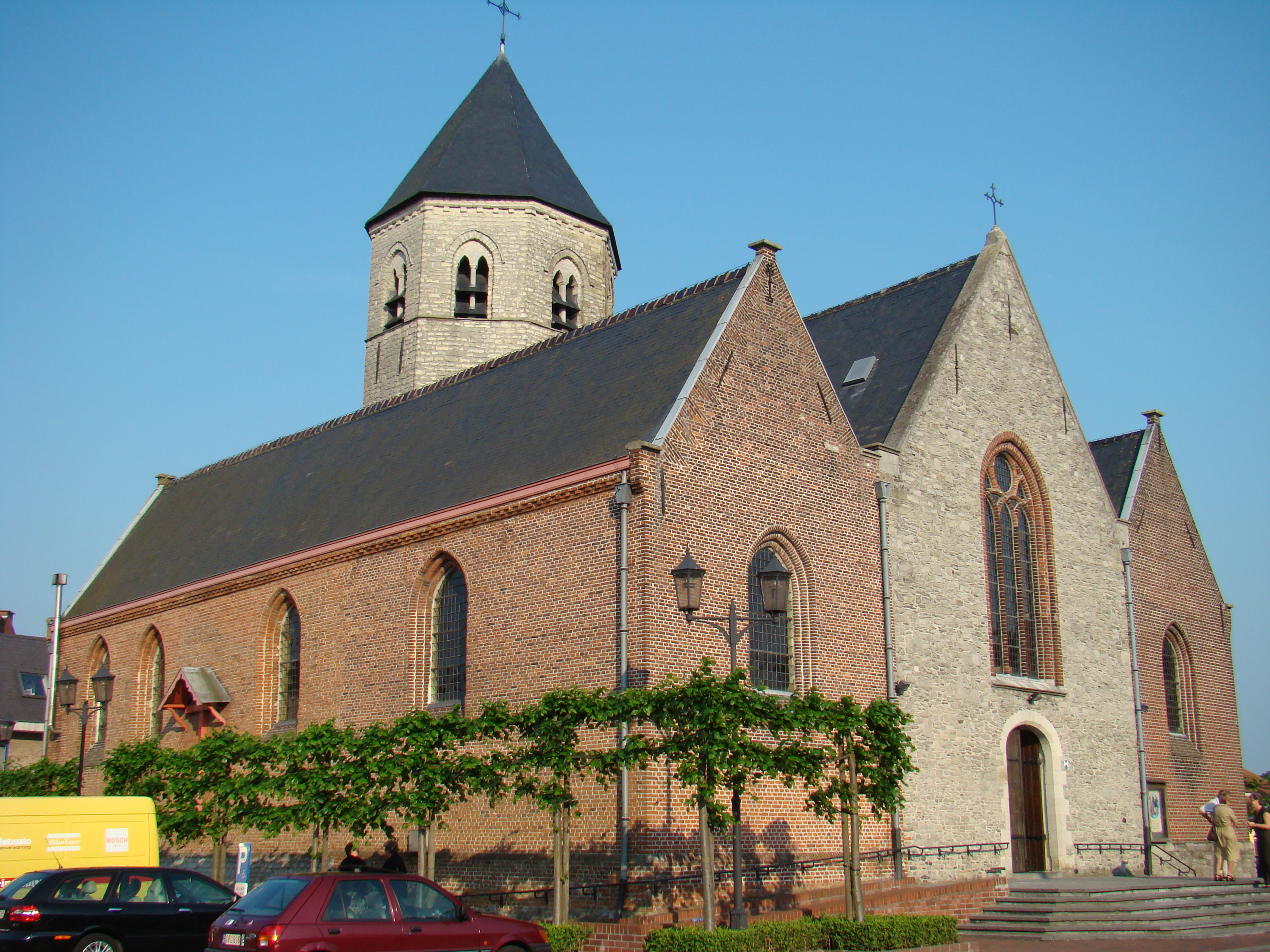 Sint-Eloois-Vijve Sint-Eligius kerk Sint-Eligius church Sint-Eloois-Vijve, Waregem, West Flanders, Belgium